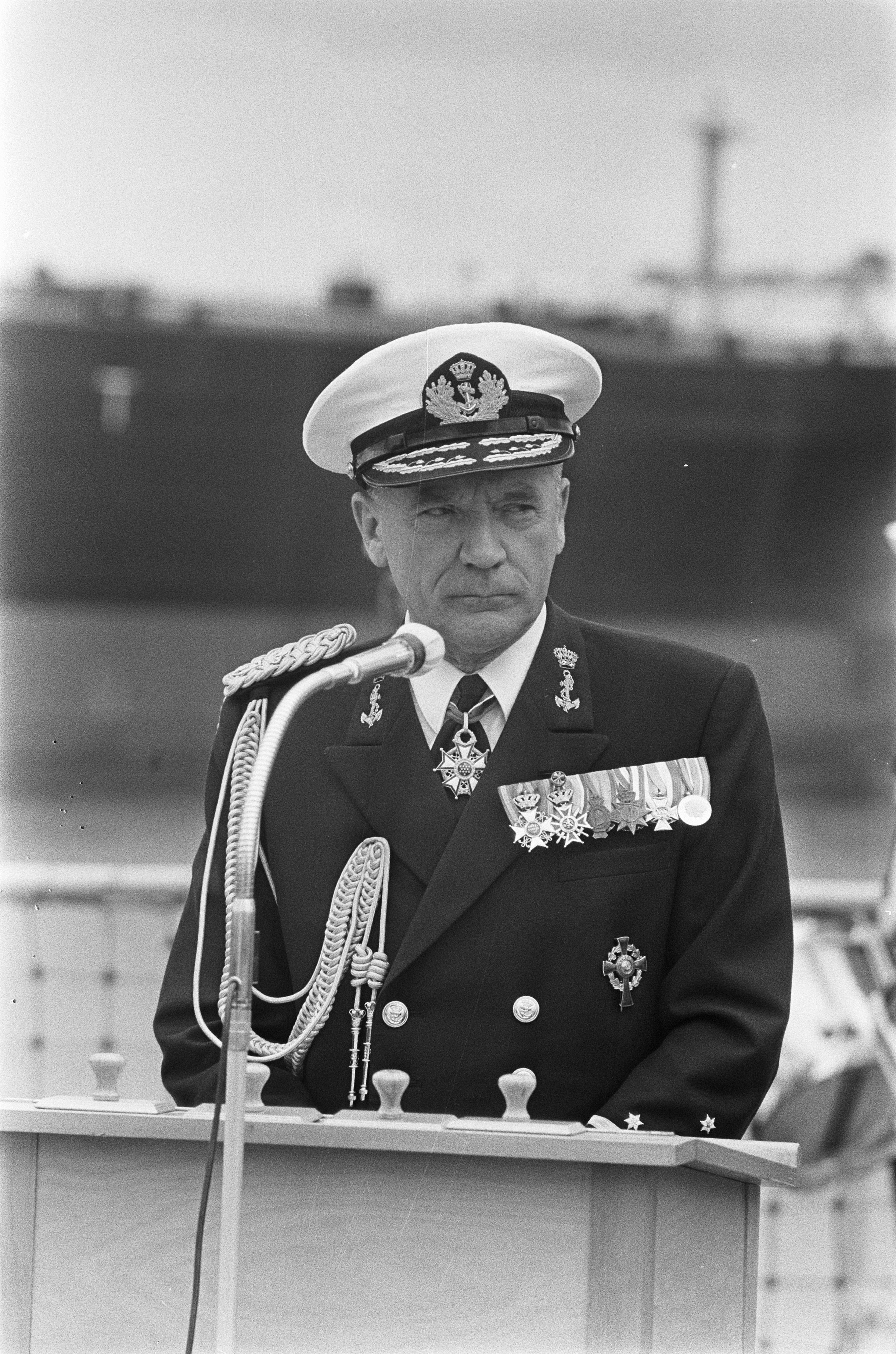 Collectie / Archief : Fotocollectie Anefo Reportage / Serie : Nieuw bevoorradingsschip op de Rijn-Schelde-Verolmewerf overgedragen aan de marine Beschrijving : Tijdens de overdracht van de "Zuiderkruis" Annotatie : Randnummers negatiefstrook: 28, 29: Schout-bij-nacht J.L. Langenberg (portretten) Datum : 27 juni 1975 Locatie : Alblasserdam, Zuid-Holland Trefwoorden : bevoorrading, commandanten, marine, schepen Fotograaf : Fotograaf Onbekend / Anefo Auteursrechthebbende : Nationaal Archief Materiaalsoort : Negatief (zwart/wit) Nummer archiefinventaris : bekijk toegang 2.24.01.05 Bestanddeelnummer : 928-0178